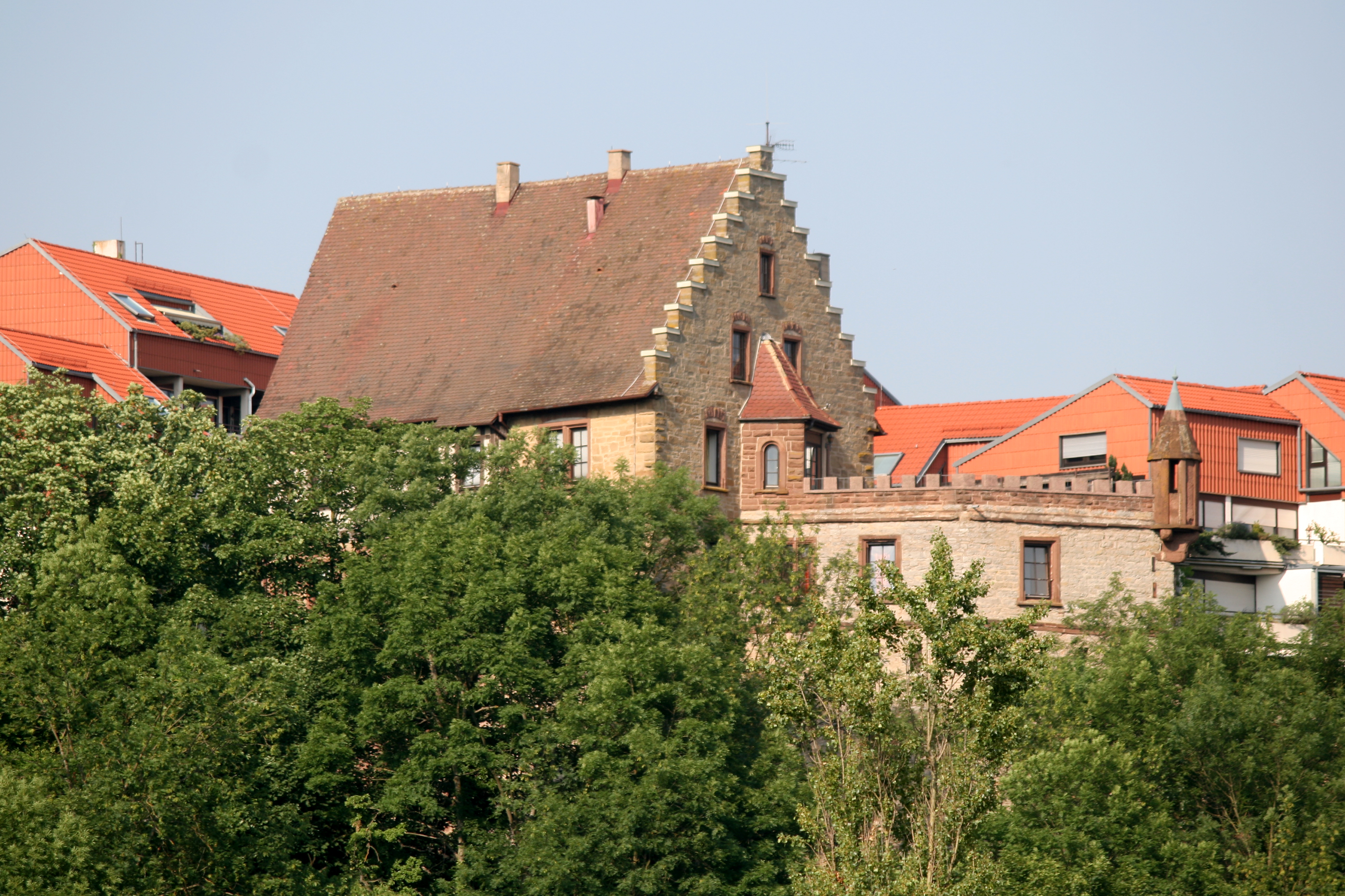 Schloss in Höfingen, Stadt Leonberg, vom Glemstal gesehen